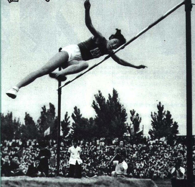 1964-08 1964年 吴浮山打破全国纪录179cm